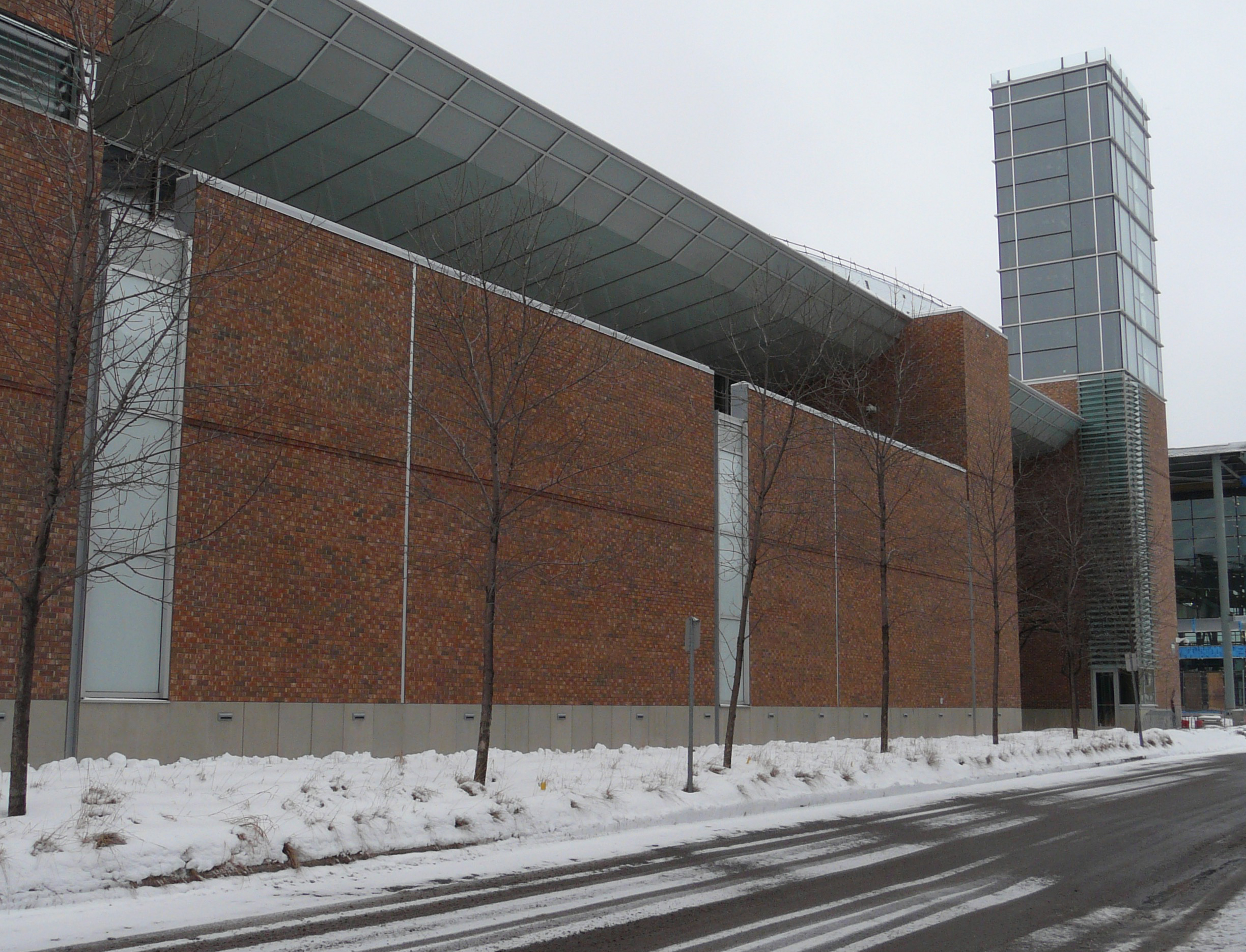 Bureaux de la station de télévision TVA-Québec